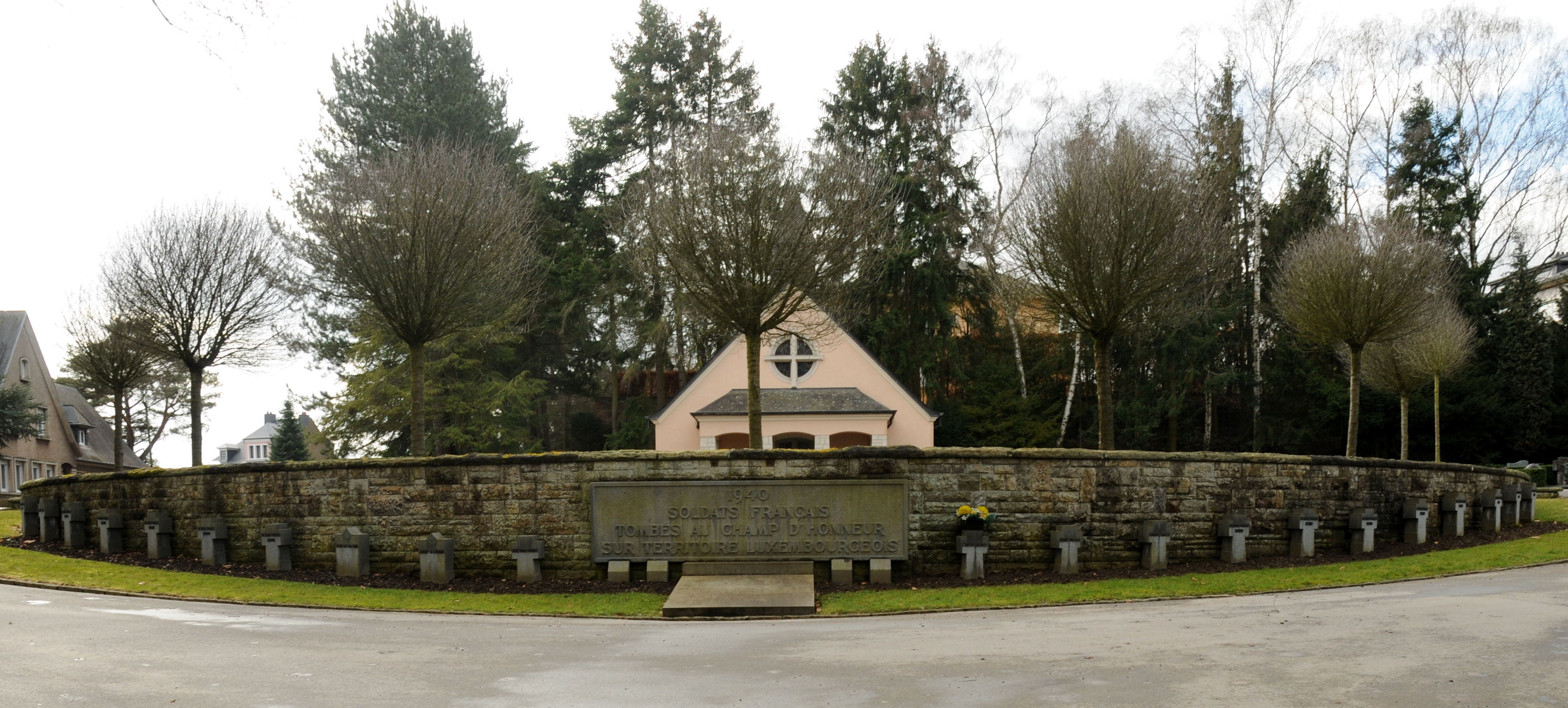 1940, Necropole fir 21 franséisch Zaldoten um neien Diddlenger Kierfecht.